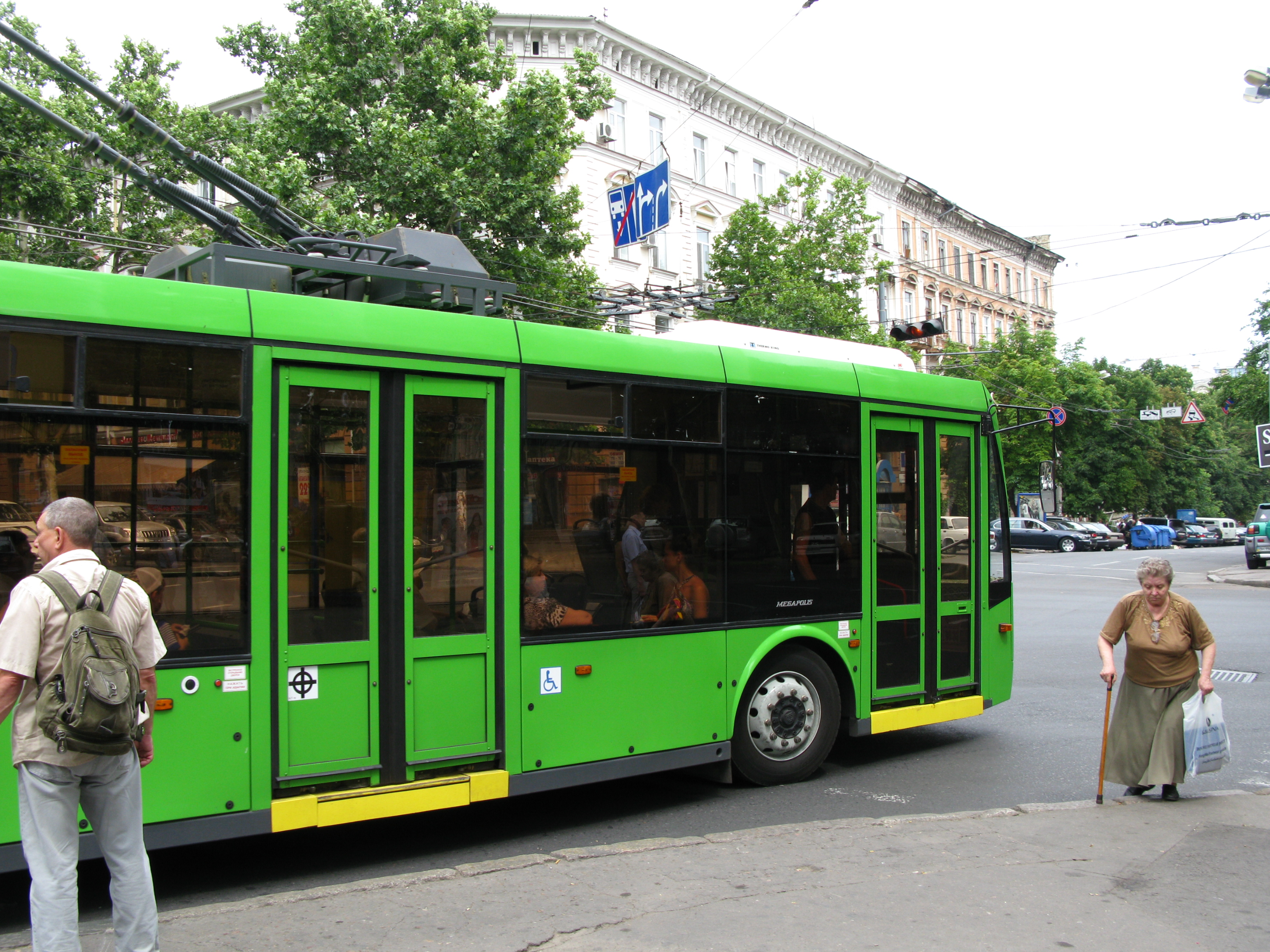 ТролЗа-5265 «Мегаполис». г.Одесса